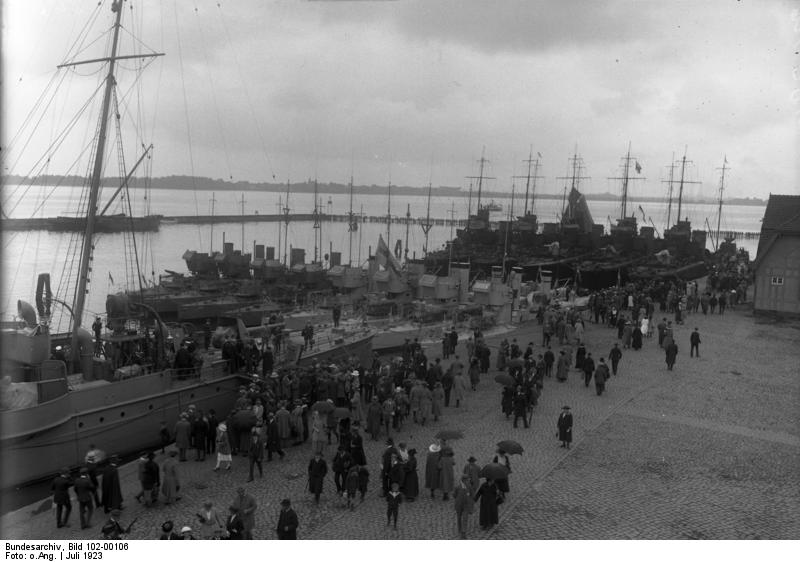 Deutsch-Schwedische Flottenzusammenkunft in Stralsund, anlässlich der Niederdeutschen Woche am 1. Juli 1923. Die schwedische und deutsche Flotte in Hafen von Stralsund.